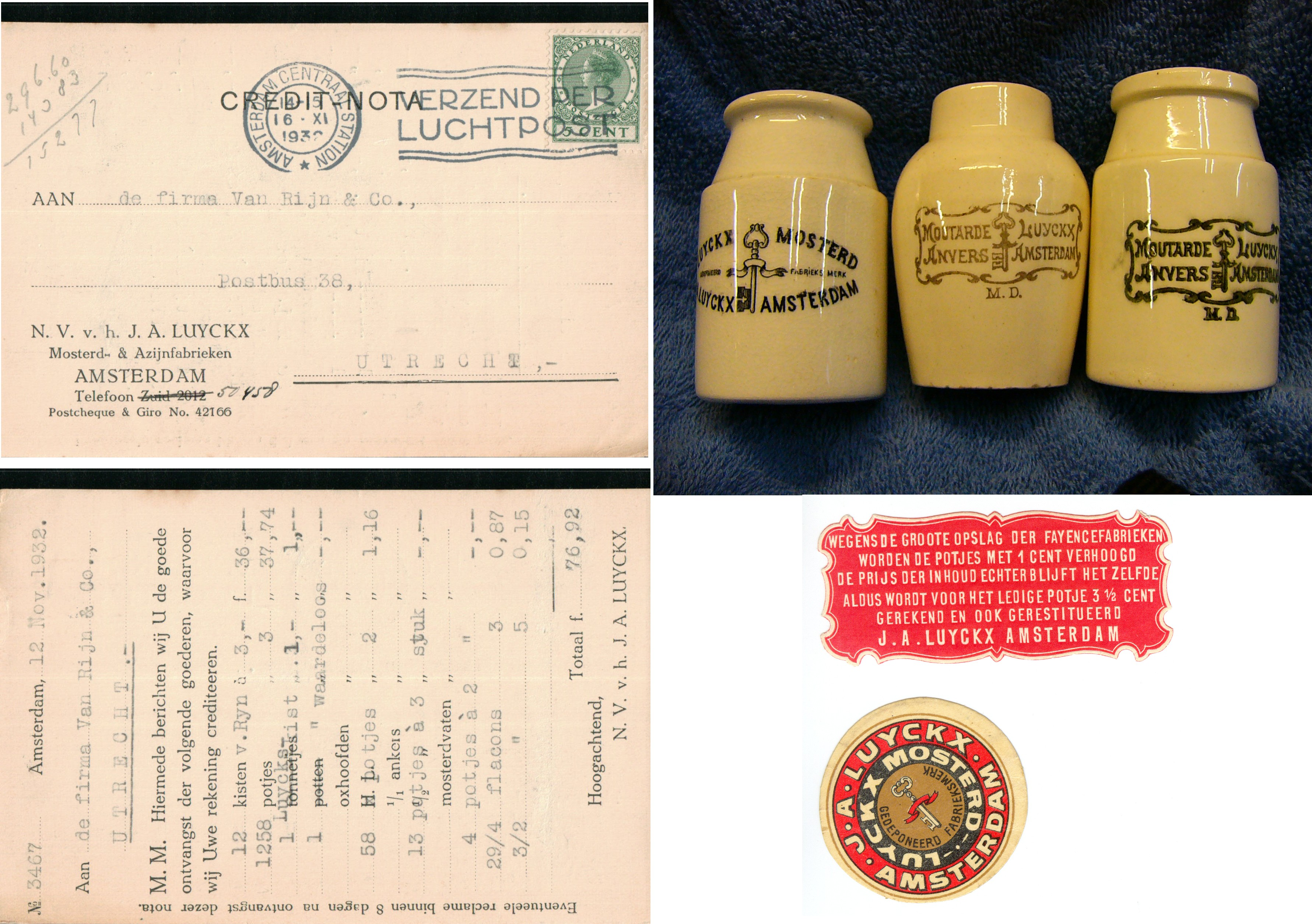 mosterdfabriek J.A.Luyckx briefkaart 1932 met mosterdpotten en etiketten